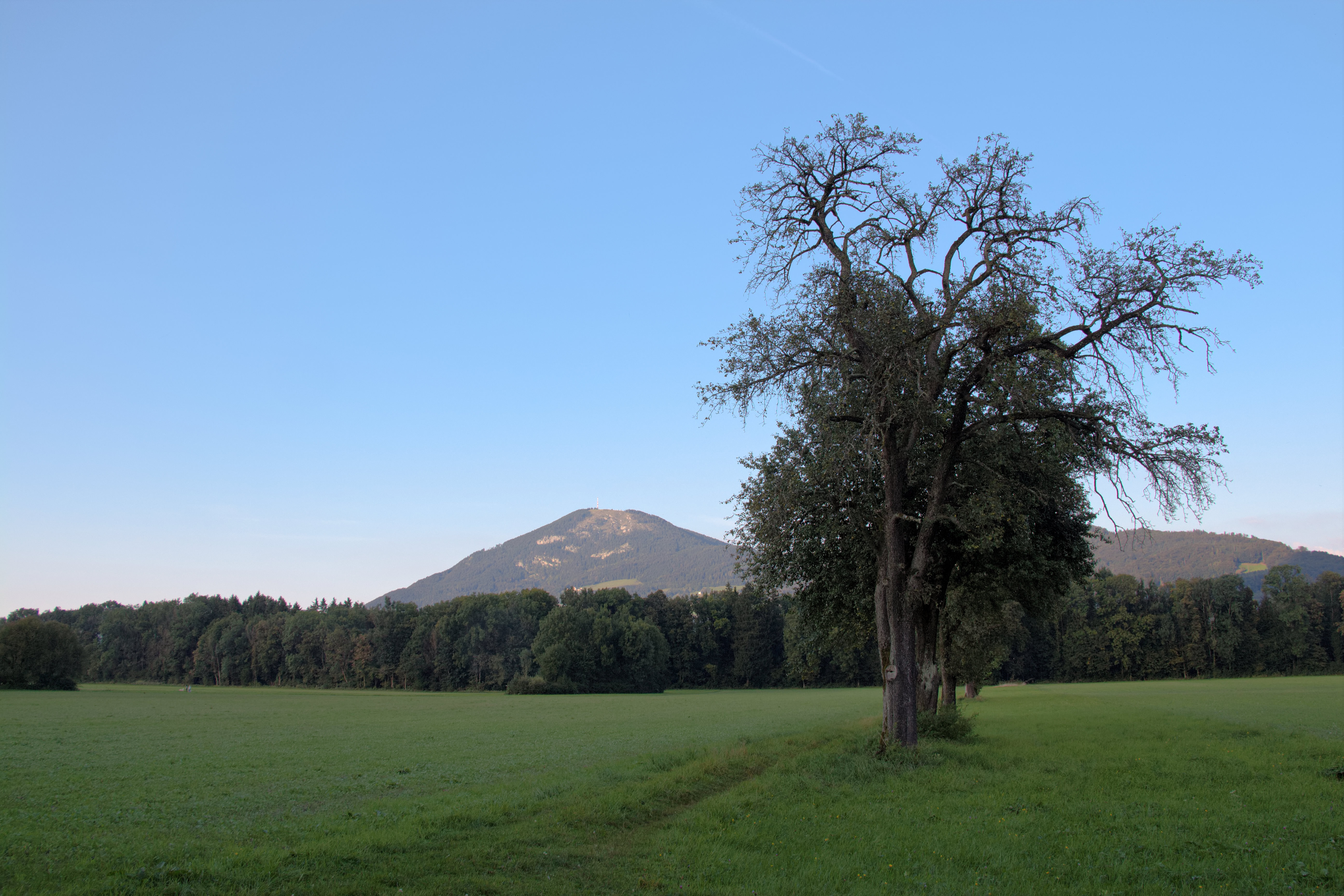 Landschaftsraum östlich der Hellbrunner Allee im Salzburger Stadtteil Morzg. Das Gebiet ist Teil des Landschaftsschutzgebiets Salzburg-Süd. Im Hintergrund der Gaiserg.